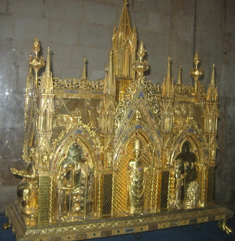 Chasse de saint Taurin, XIIIe siècle, église Saint-Taurin, Évreux (Eure)